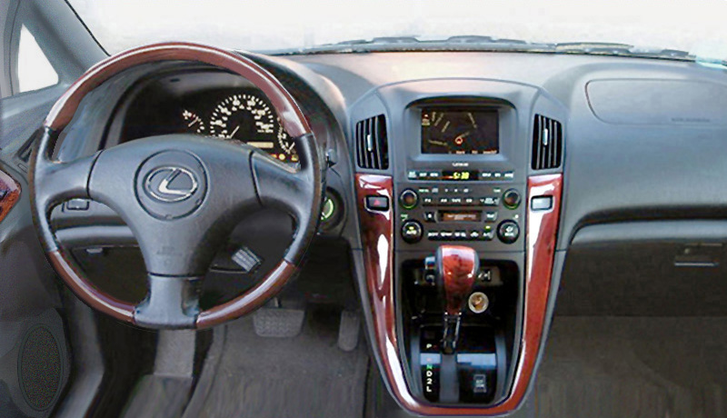 first gen Lexus RX